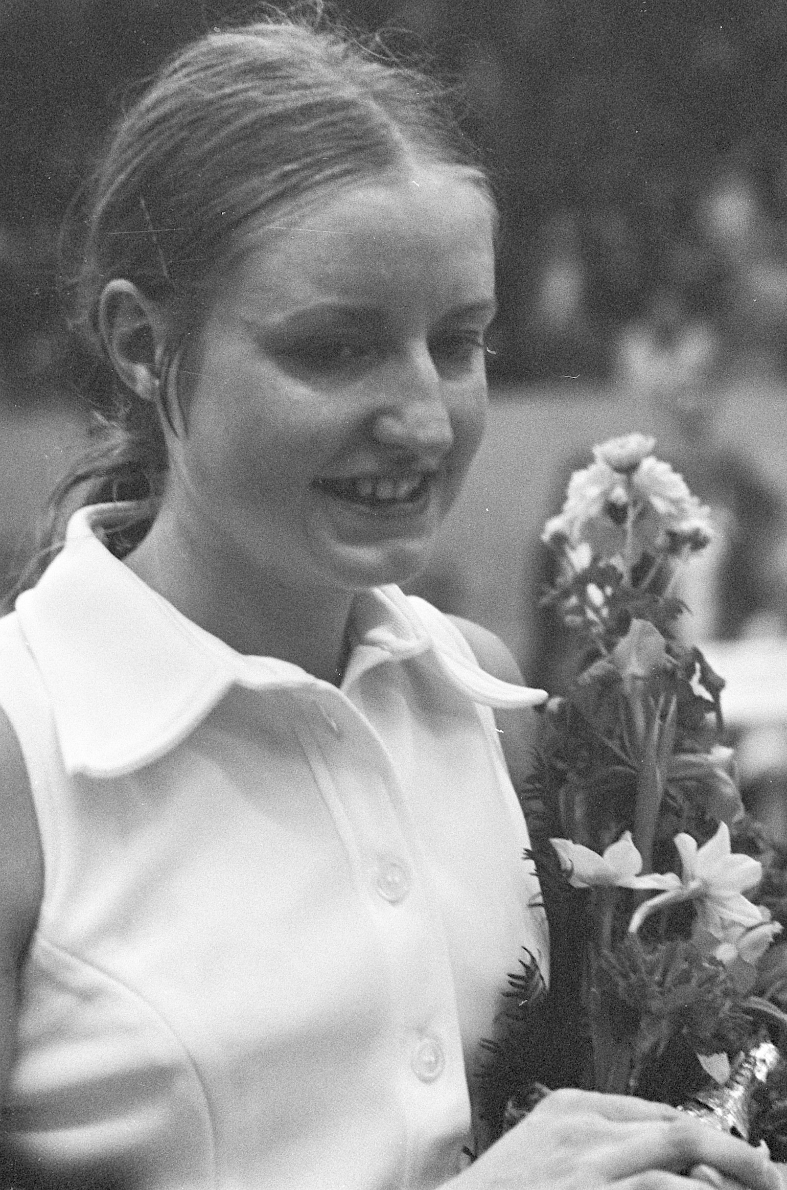 Internationale kampioenschappen Badminton te Beverwijk, Gillian Gilks